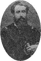 Sargento Mayor Manuel Rodríguez Ojeda, participa en la guerra del Pacífico, inmortalizado en la novela "Adiós al sépimo de línea"